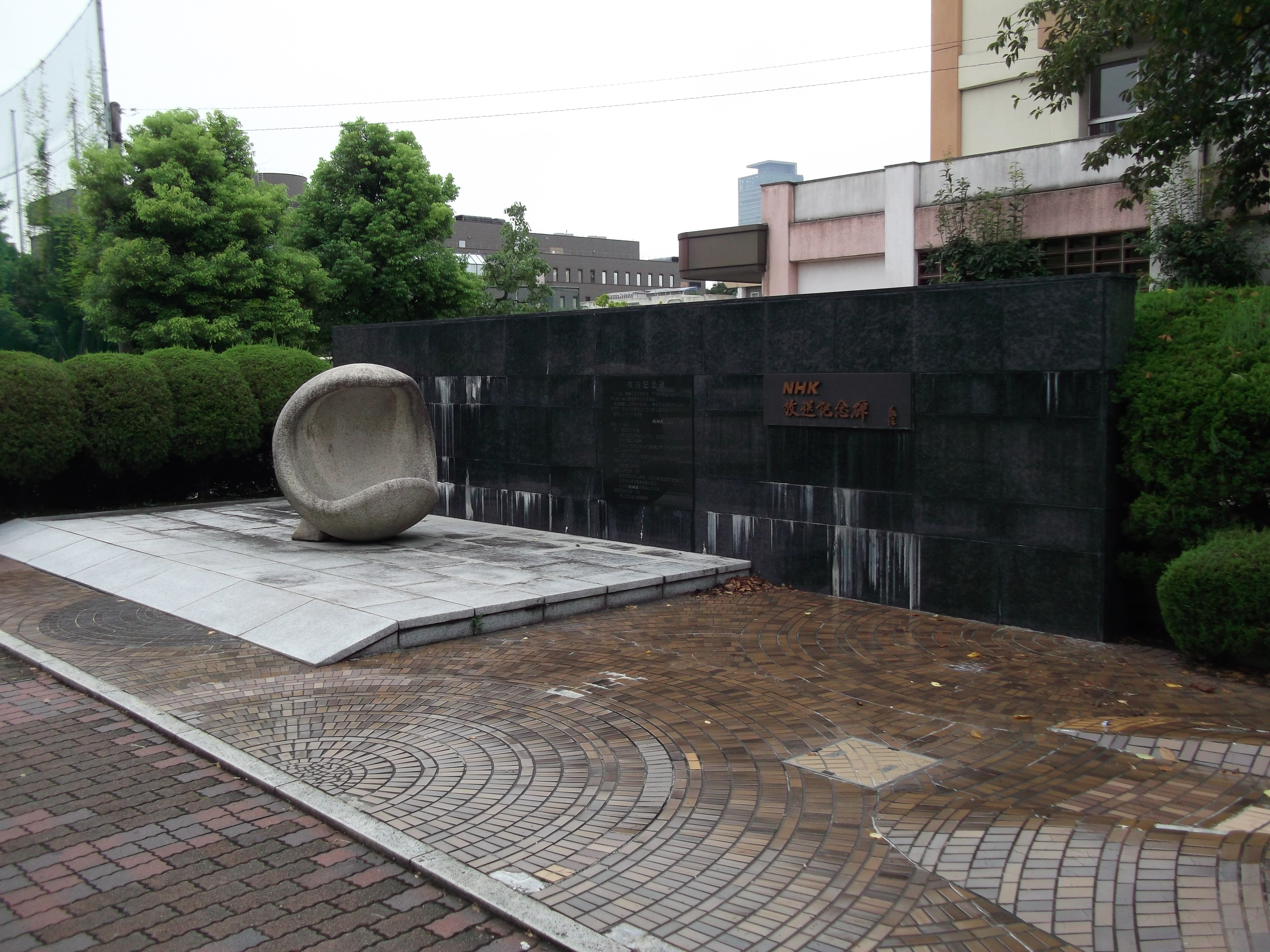 名古屋市中区三の丸の「NHK放送記念碑」を東側公道北側より撮影。